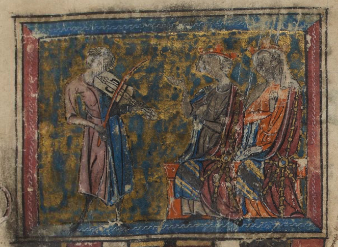 Thibaud I de Navarre écoutant un musicien